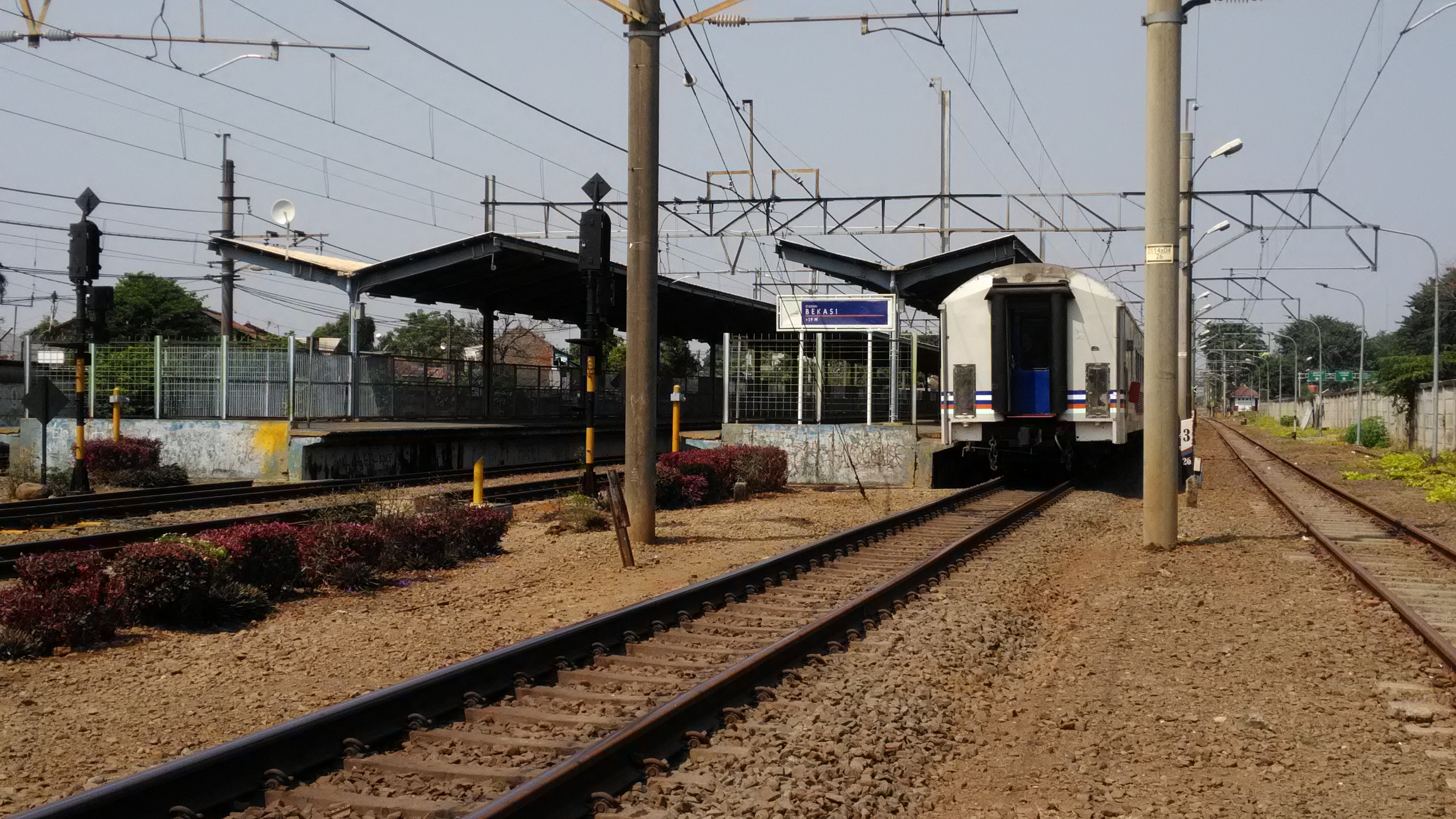 Stasiun Bekasi dan KA Cirebon Ekspres sedang berhenti untuk layani naik/turun penumpang